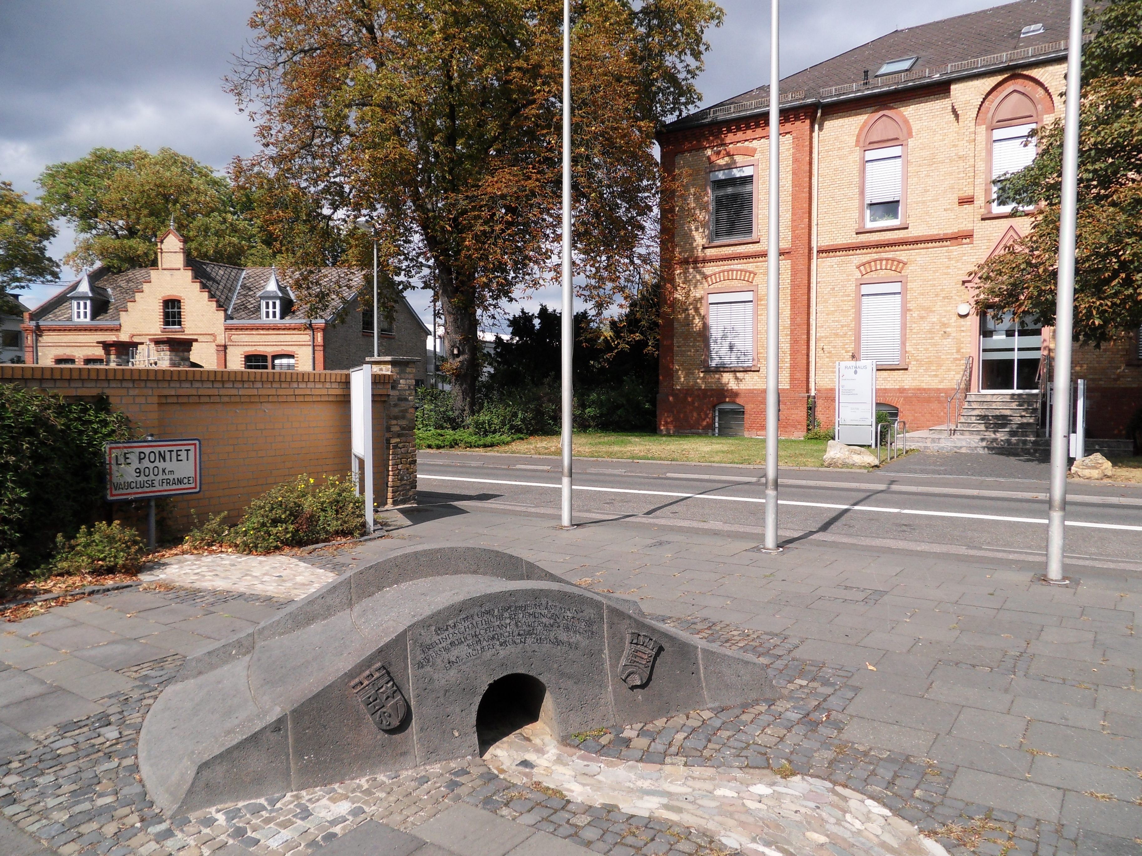 Rathaus von Hochheim am Main mit Le-Pontet-Platz, benannt nach der französischen Partnerstadt Le Pontet (Vaucluse)